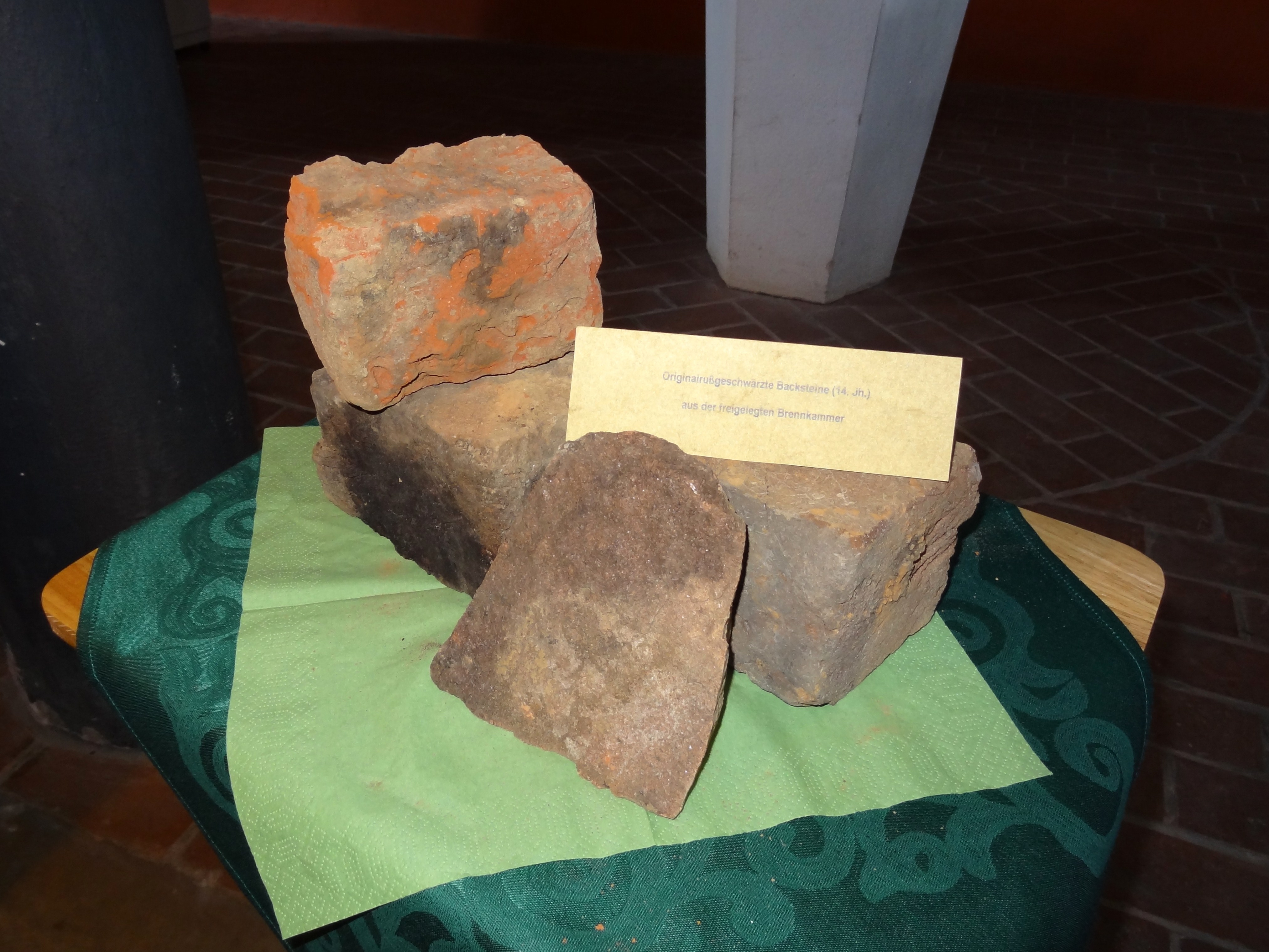 Funde der Ausgrabung des Altenhof in Schönerlinde im Mai 2011, Land Brandenburg, Deutschland (Ausgestellt in der Kirche von Schönwalde)